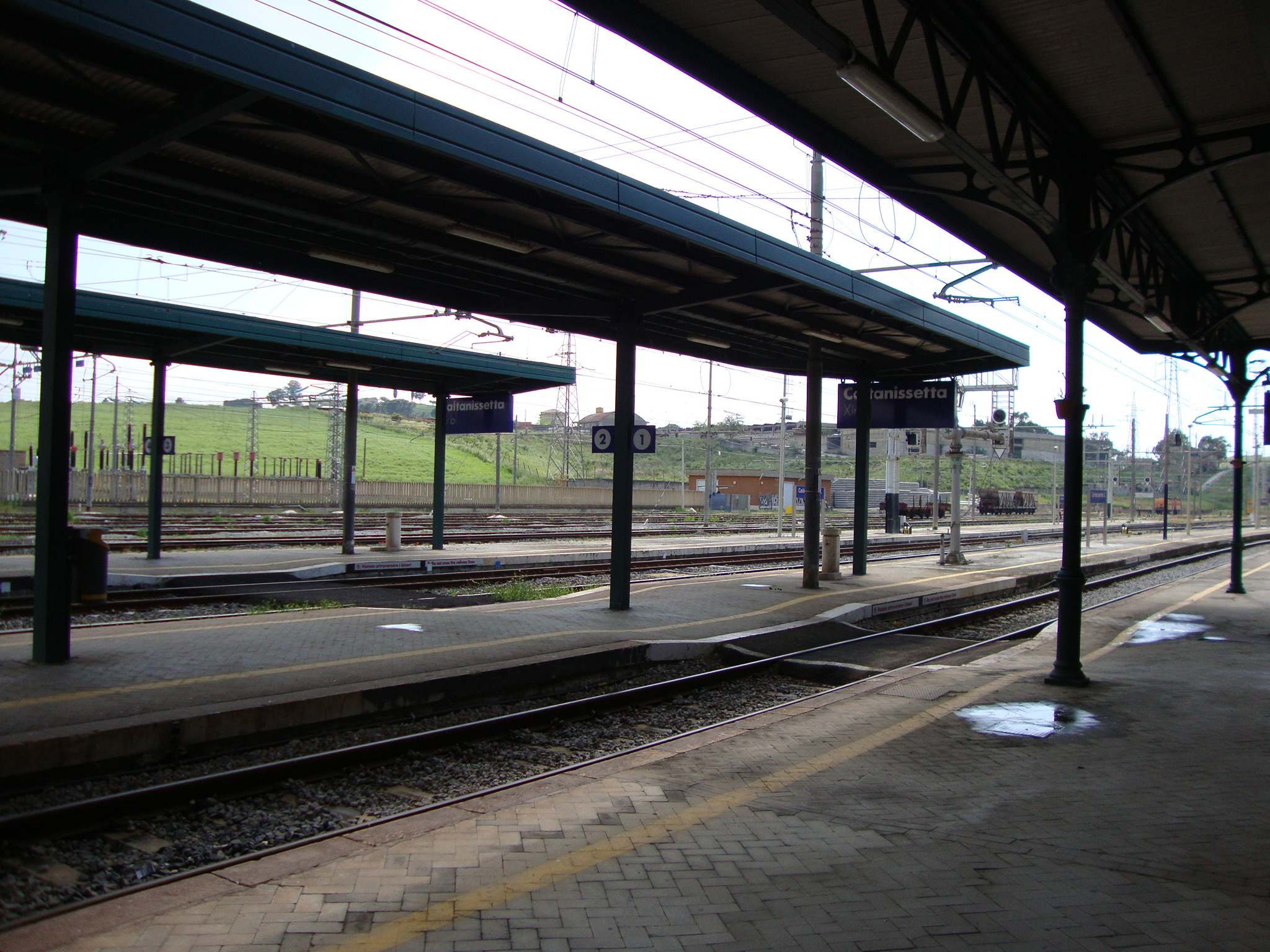 Veduta interna dello scalo ferroviario di Caltanissetta Xirbi.